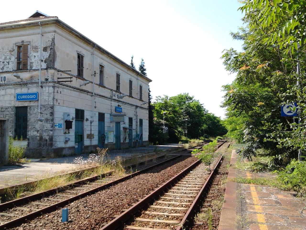 Stazione di Cureggio: binari lato Santhià